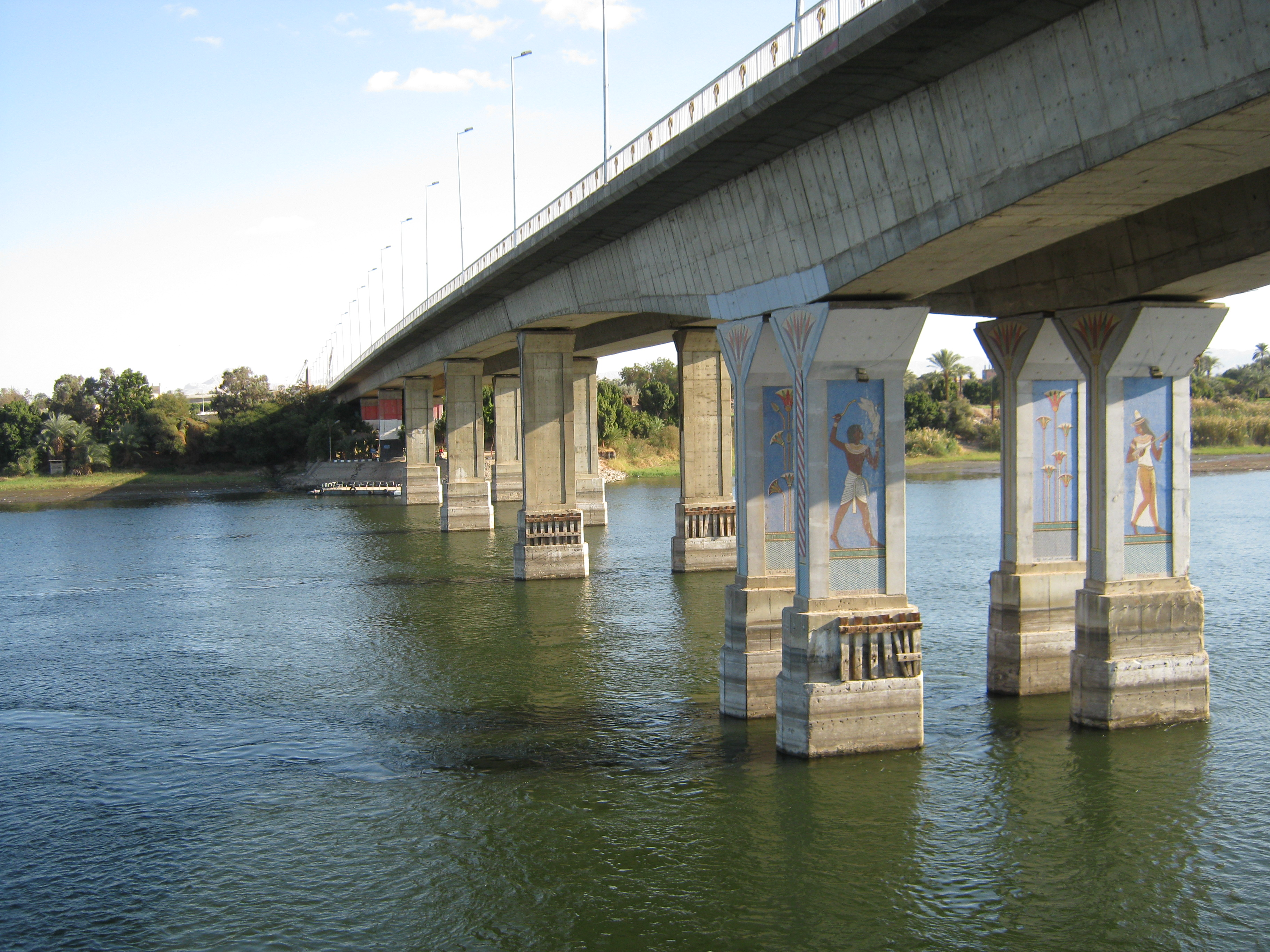 River Nile, Luxor Bridge.